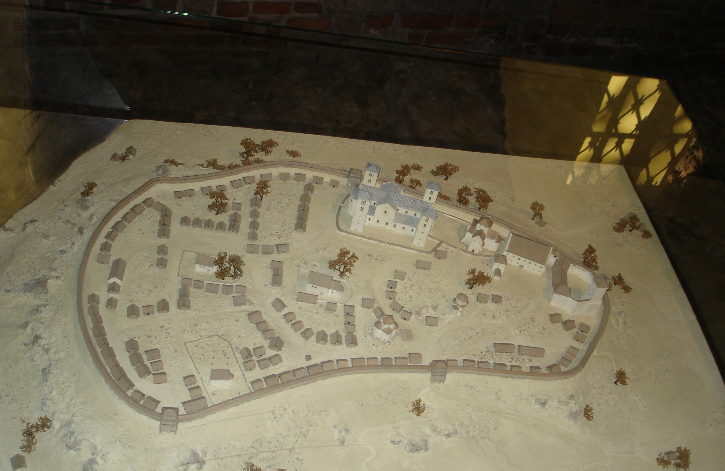 Modell der Wawelburg aus der Zeit des Mittelalters während der Besuchertour "Versunkener Wawel"